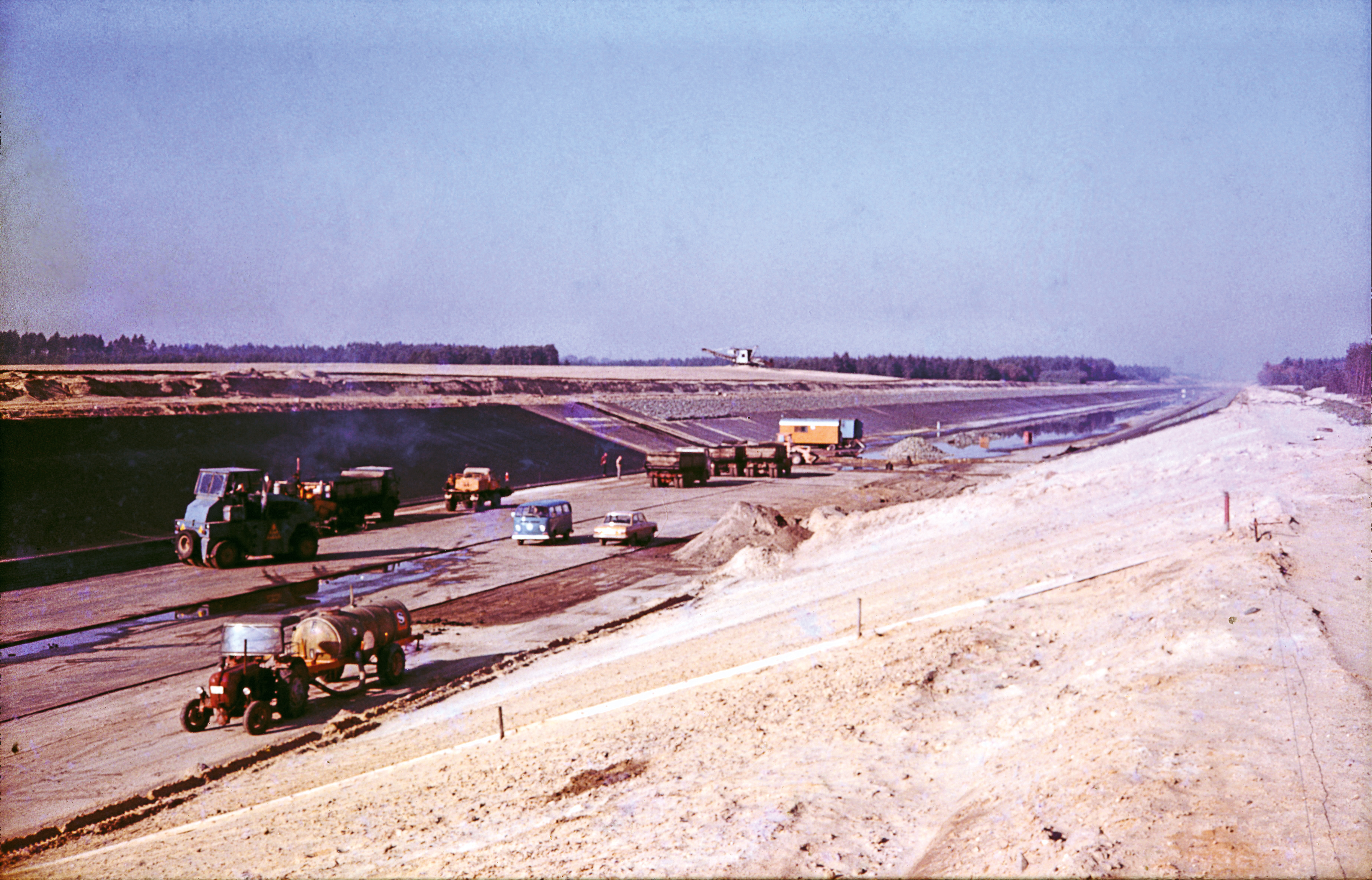 Elbeseitenkanal im Bau September 1971 bei Lüneburg - Blick in den leeren Kanal; im Vordergrund vorbereitetes Planum, links die frisch eingebrachte Dichtung, rechts das fertige Profil mit Deckwerk